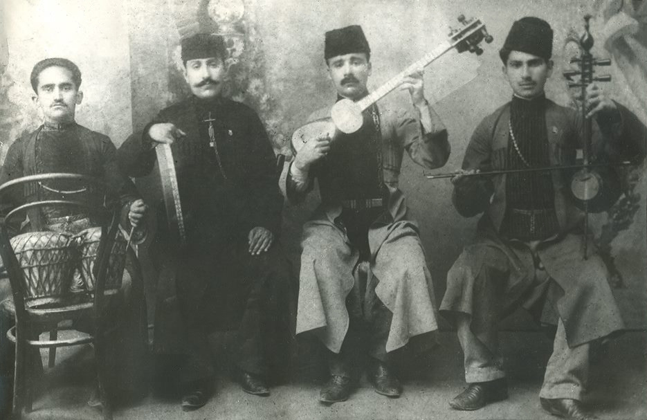 Ансамбль Мешади Джамиля Амирова. Слева направо:парная нгара шошан, ханенде Мешади Мамед Фарзалиев, тарист Мешади Джамиль Амиров, кеманчист Левон Гараханов. Гянджа, 1919 год